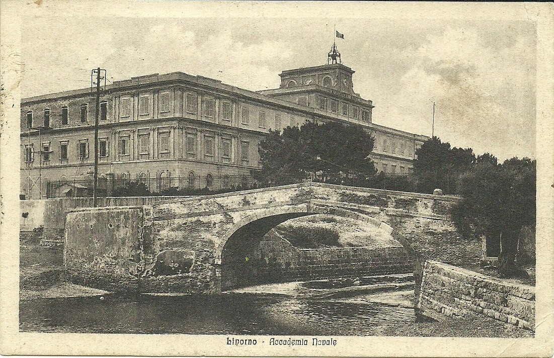 Altro particolare della foce del Rio Maggiore su cartolina, anno 1927.